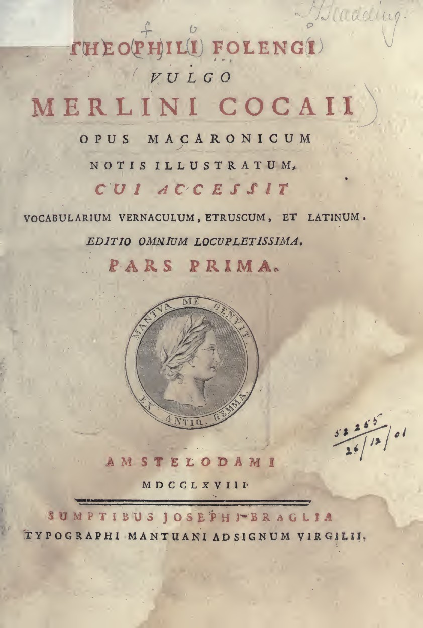 Theophili Folengi vulgo Merlini Cocaii Opus Macaronicum notis illustratum. cui accessit vocabularium vernaculum, Etruscum, et Latinum … Pars prima [-altera]. 1. - Amstelodami [i.e. Mantova] : sumptibus Josephi Braglia typographi Mantuani ad signum Virgilii, 1768. - [4], 8, LV, [1], 307, [19] p., 1 c. di tav. ripieg. : ill. - Ritratto dell'Autore inciso da Domenico Cagnoni su disegno di Domenico Maria Conti. - Iniziali, testatine e finalini calcografici. - Frontespizio stampato in rosso e nero . frontespizio